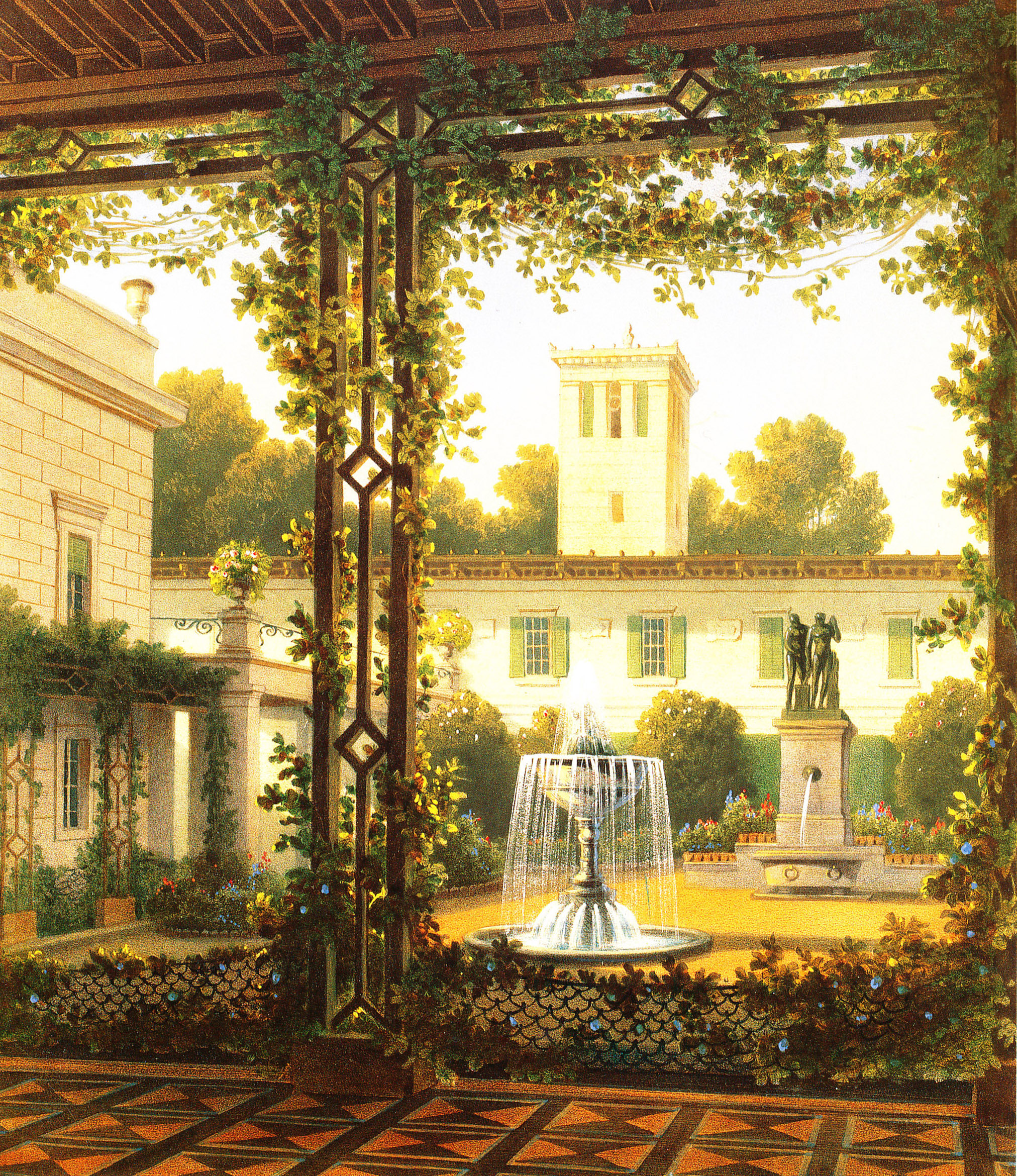 Ansicht des Gartenhofs in Klein-Glienicke um 1837/38